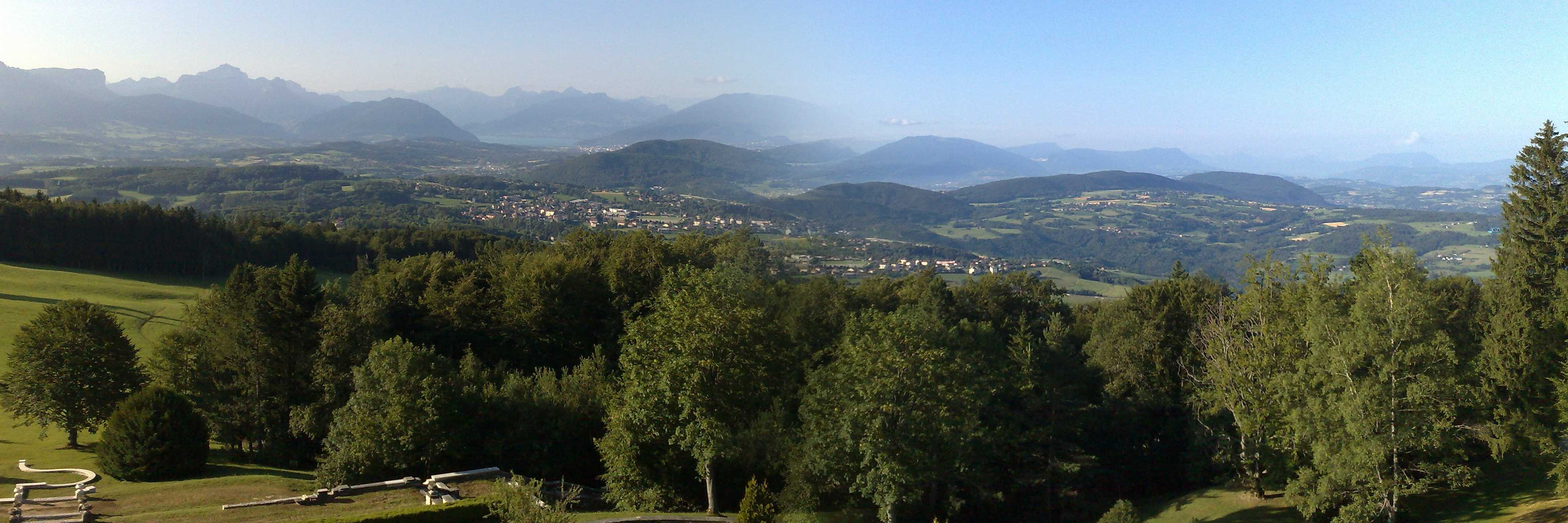 Panorama depuis le château des Avenières en Haute-Savoie, France, les Alpes, le lac d'Annecy et Cruseilles.